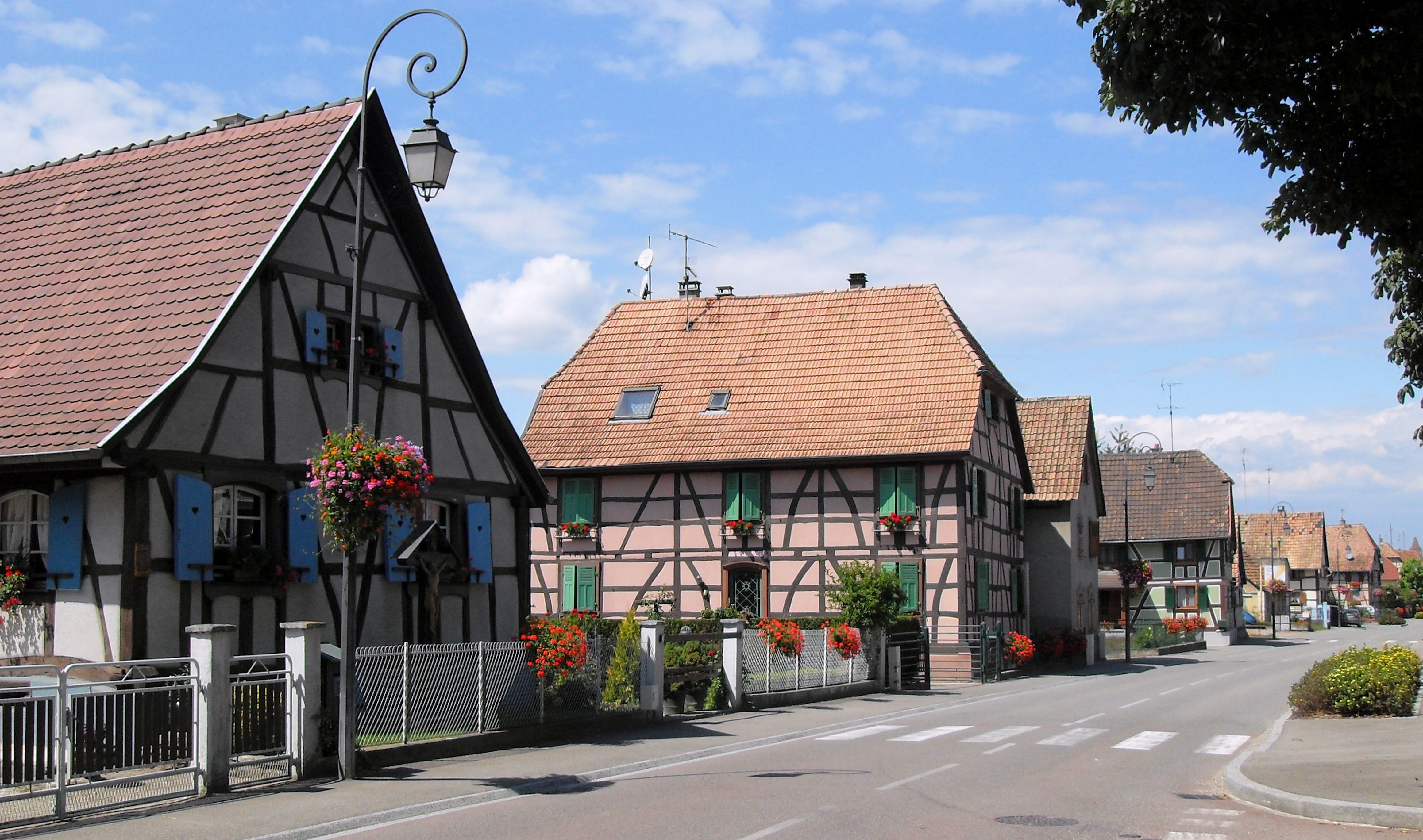 Oberdorf, Rue Principale